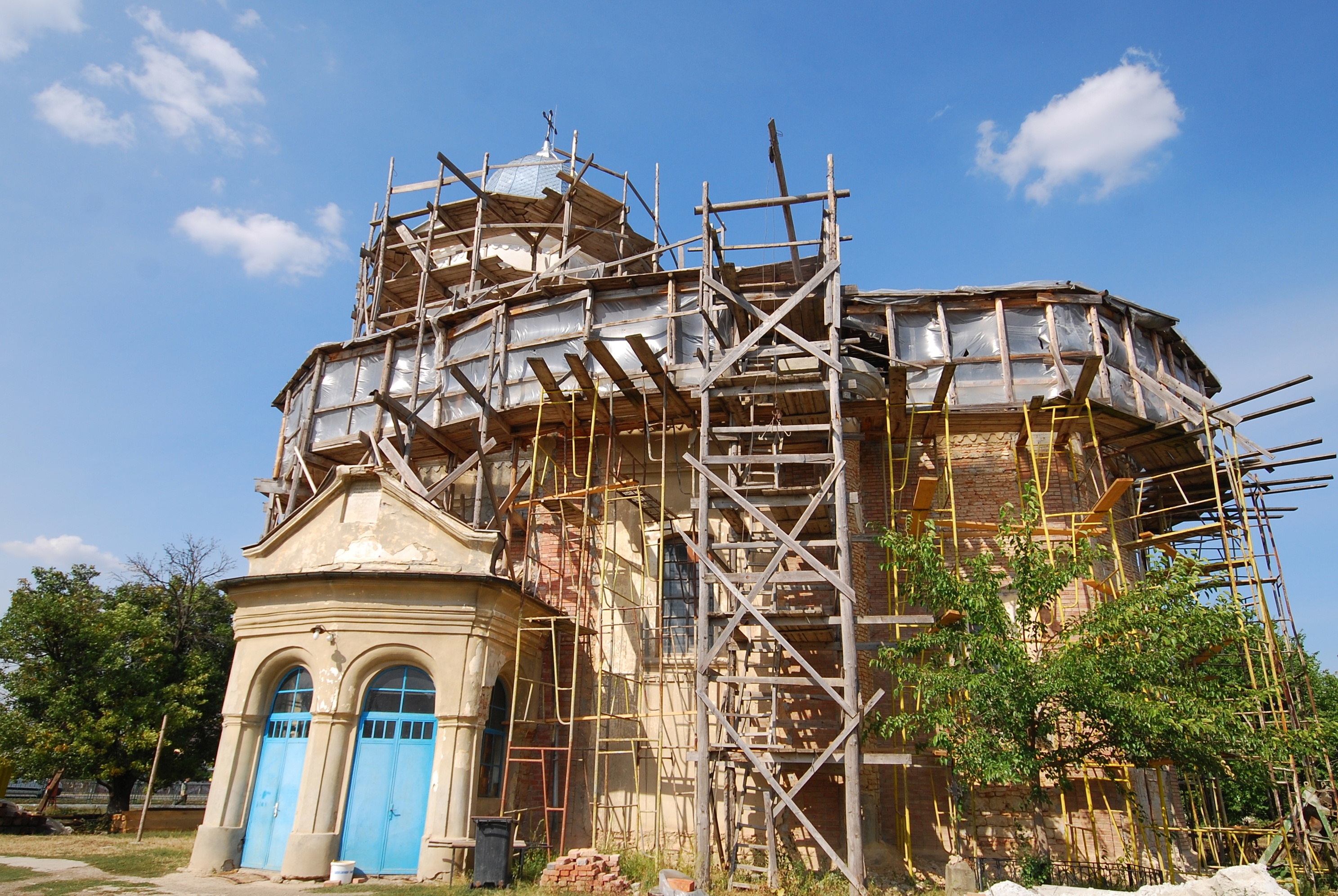 Biserica "Sf. Nicolae"